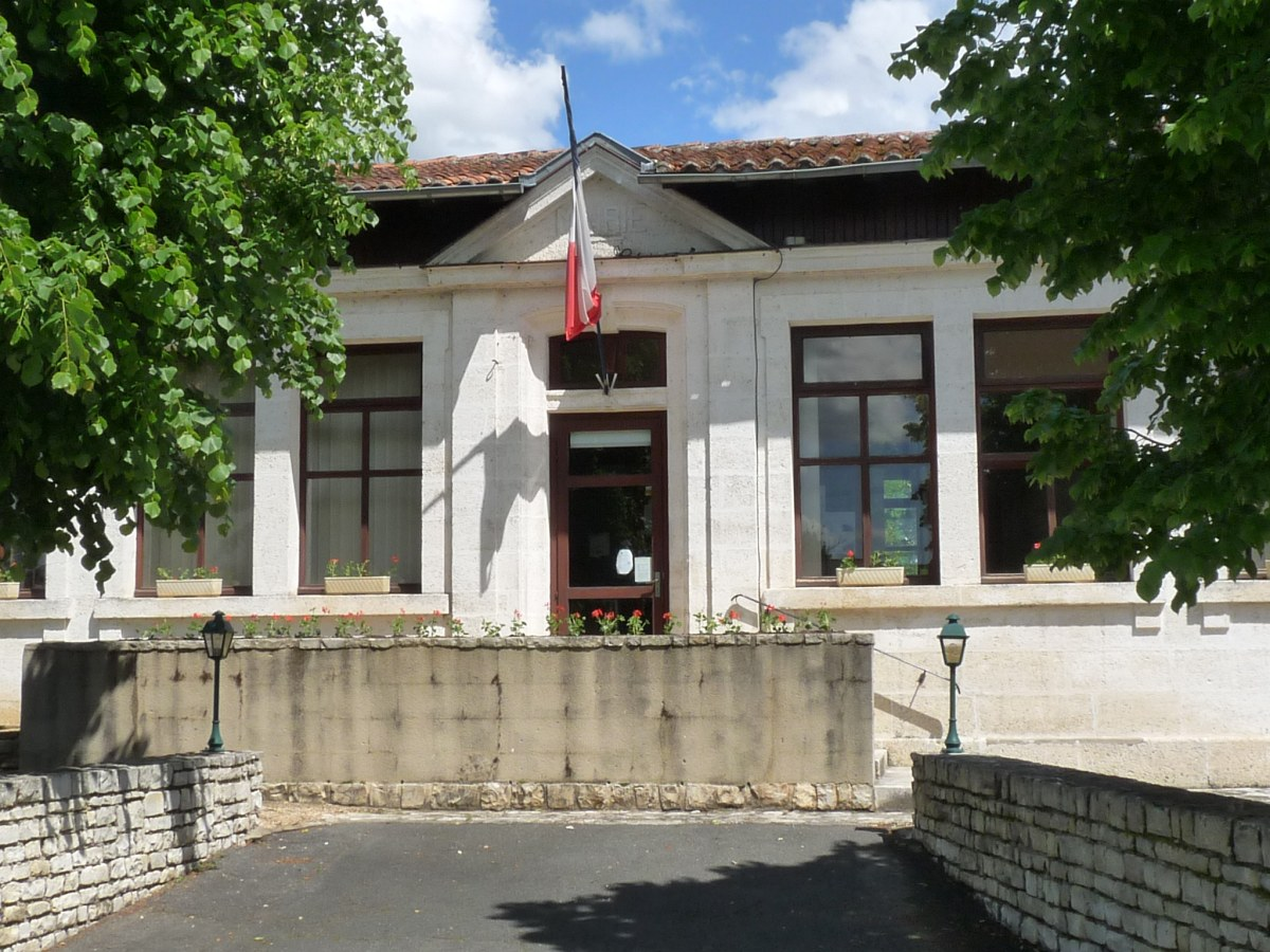 Mairie d'Agris, Charente, France